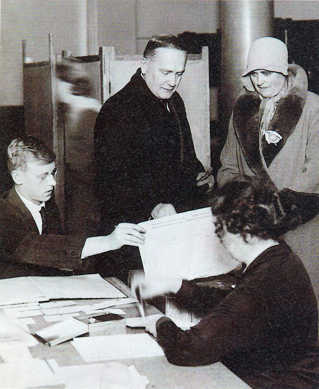 Tasavallan presidentti Lauri Kristian Relander ja rouva Signe Relander äänestämässä vuoden 1930 eduskuntavaaleissa.